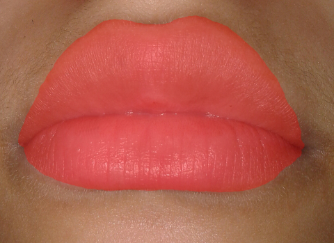 إحمرار